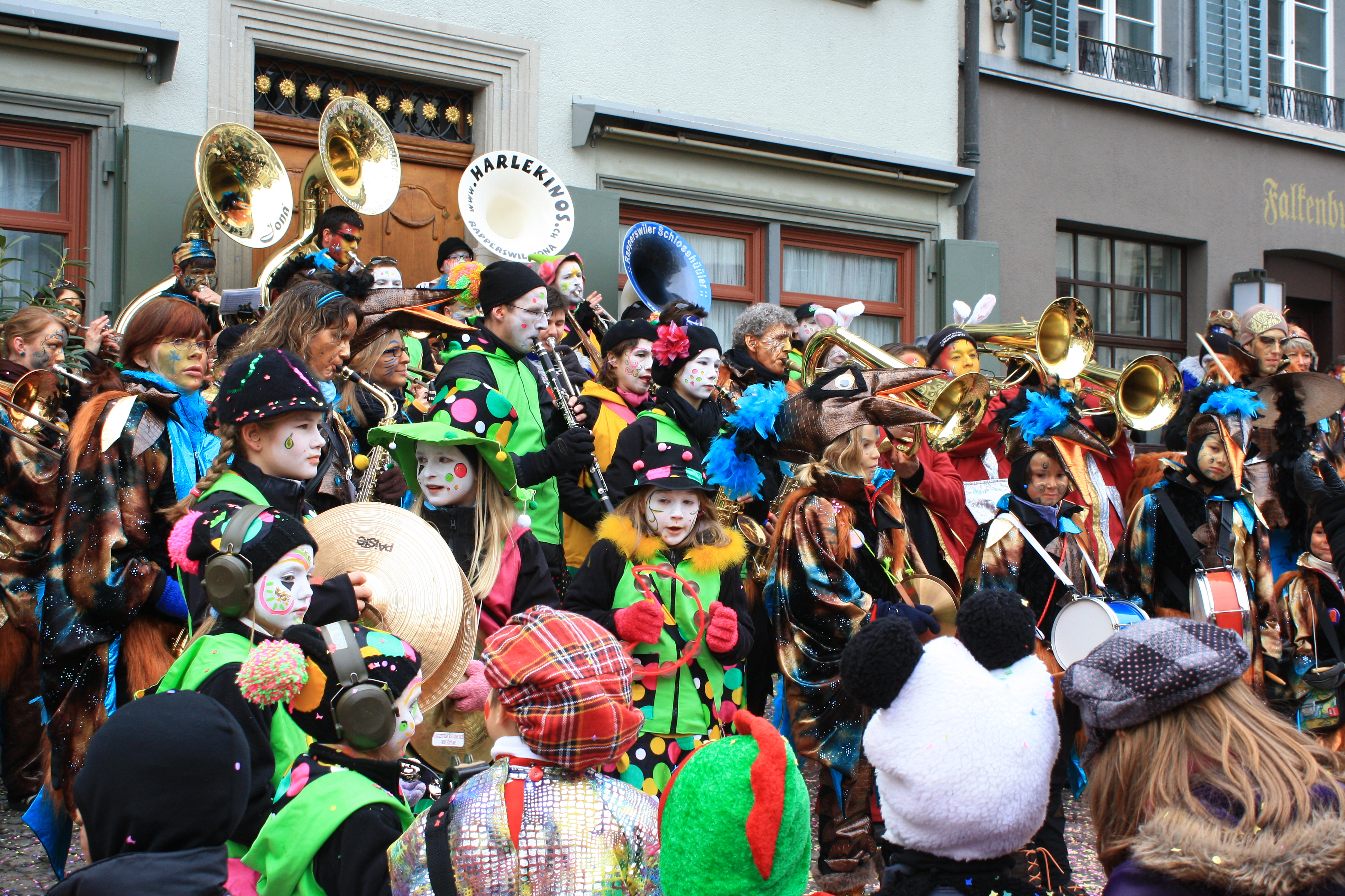 Eis-zwei-Geissebei at Rathaus on Hauptplatz in Rapperswil (Switzerland)